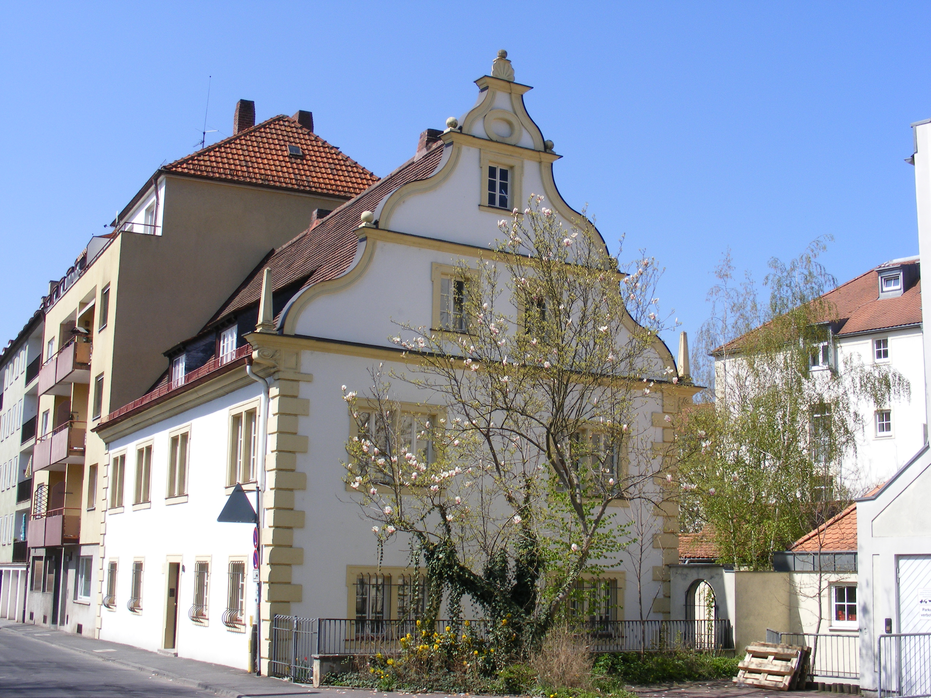 Würzburg - Kapuzinerstr. 31 (Schildbeschriftung: "Seit 1677 Mühlhaus des Kartäuserkloster "Zum Engelgarten").